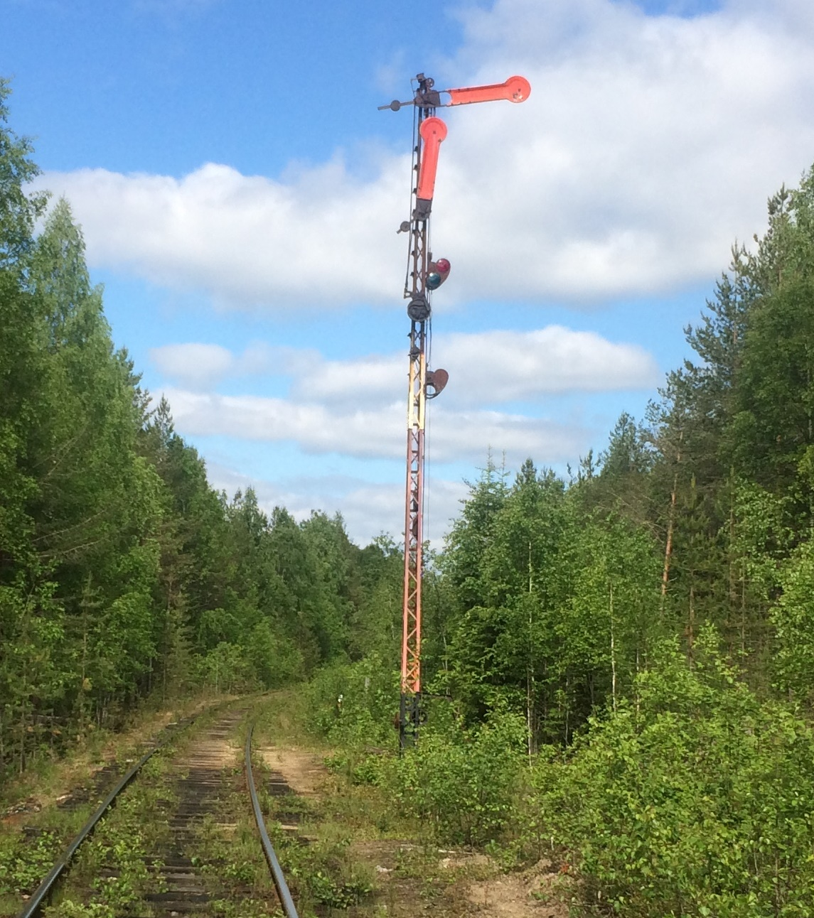 Входной светофор ст. Лендеры.